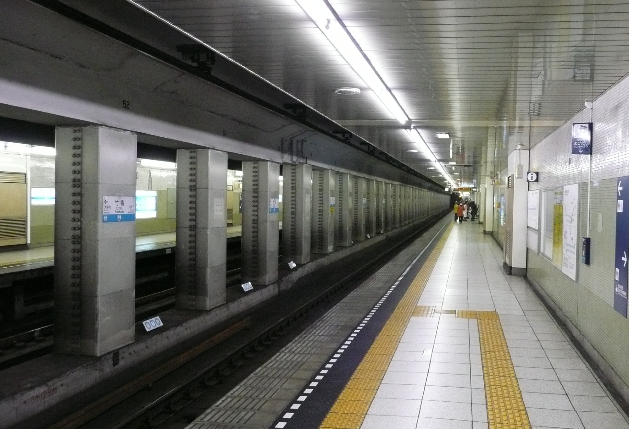 竹橋駅1番ホーム